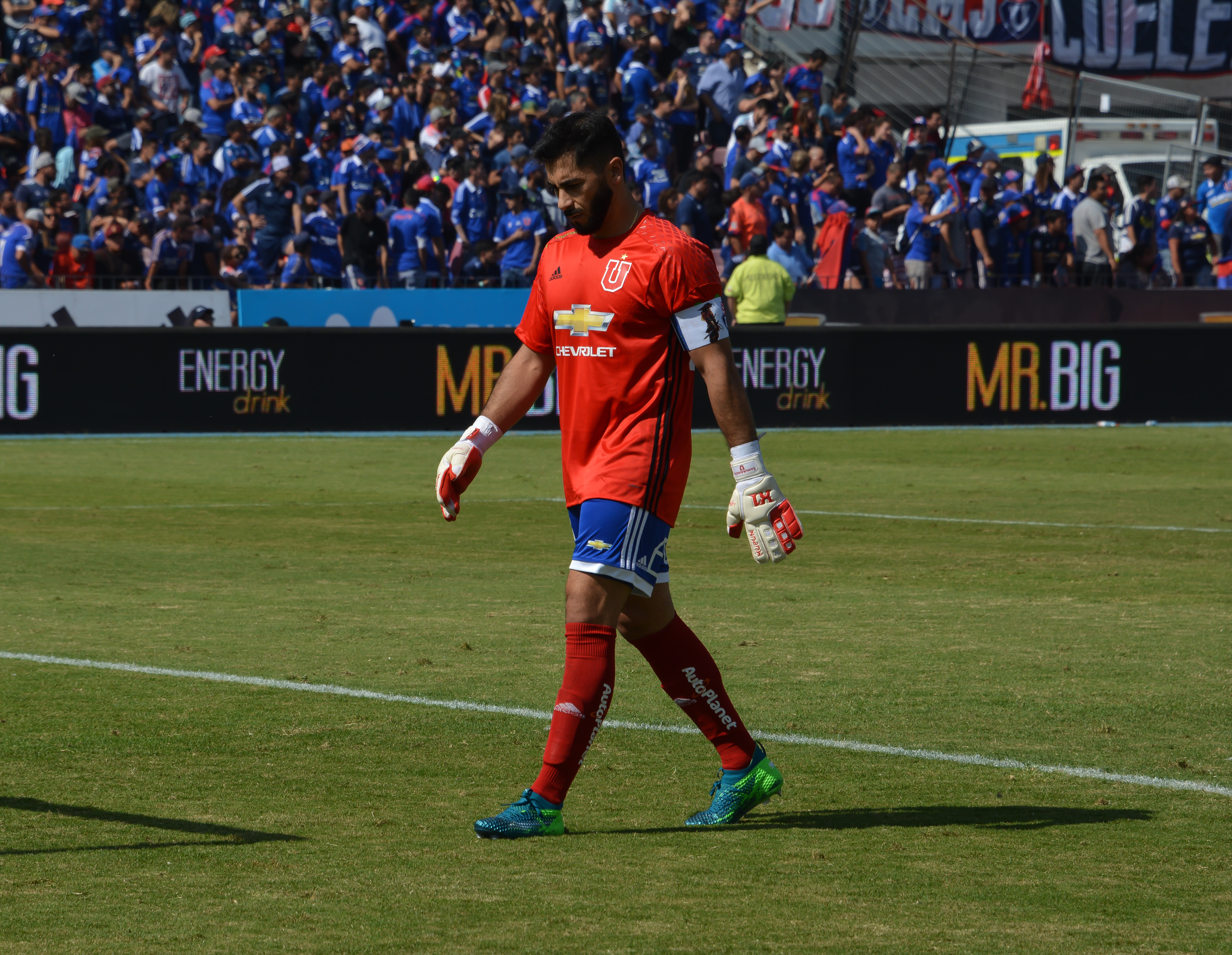 Universidad de Chile v Colo-Colo, Estadio Nacional, Santiago, Chile.